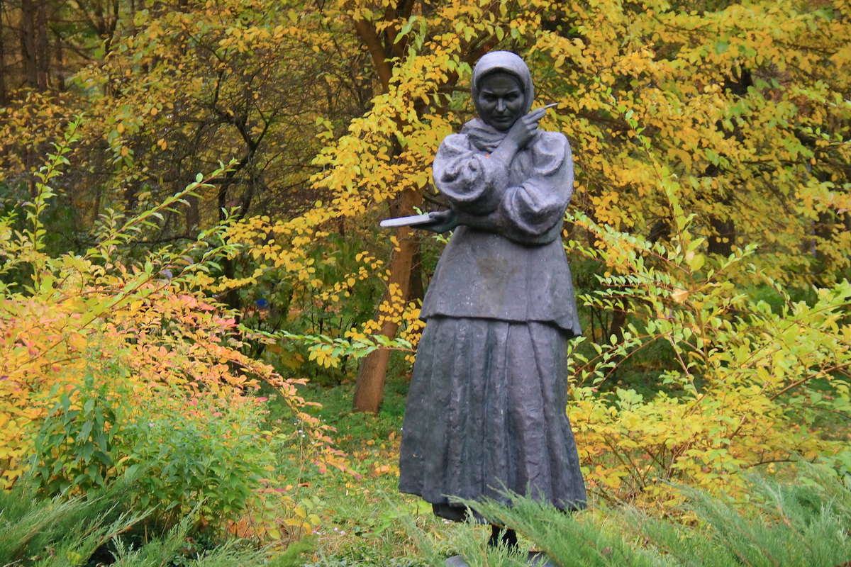 Пам'ятник Катерині Білокур у місті Яготин, Київська область, Україна